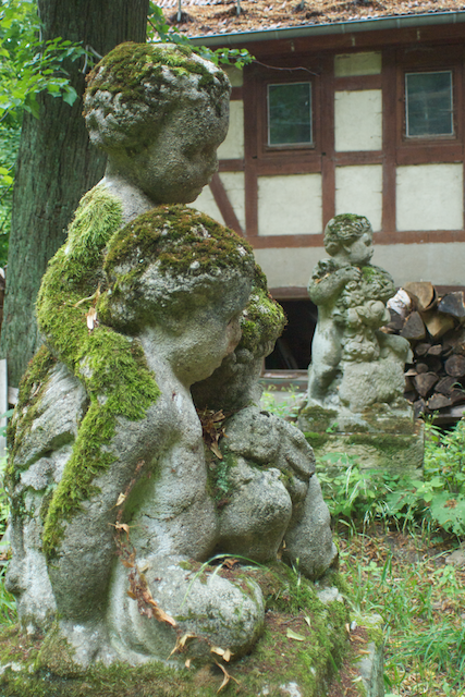 Putten 2, Grundmuehle (Radeberg), Deutschland, Sachsen